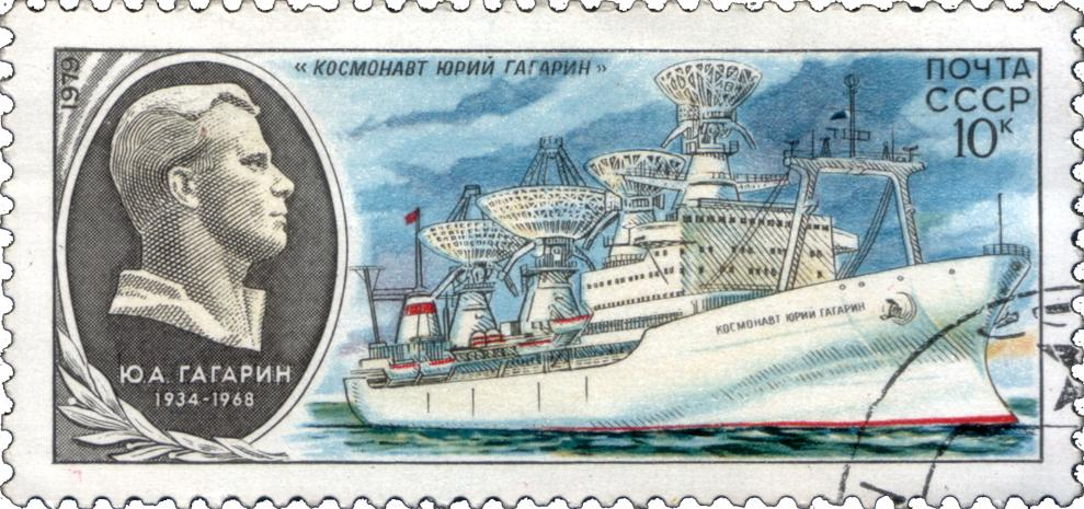 Марка Космонавт Юрий Гагарин